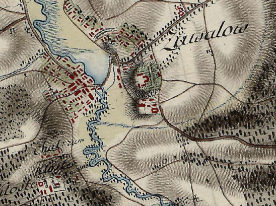 xviii